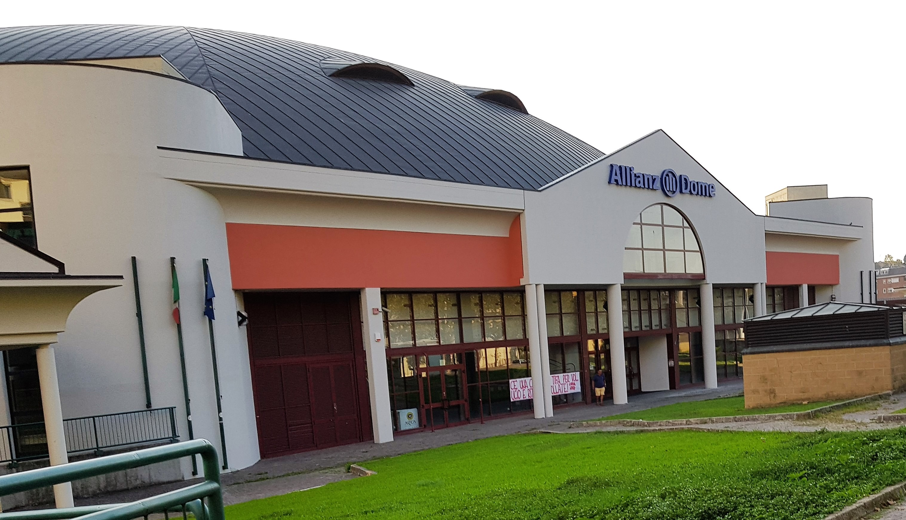 Palazzetto dello sport "PalaRubini Allianz Dome"